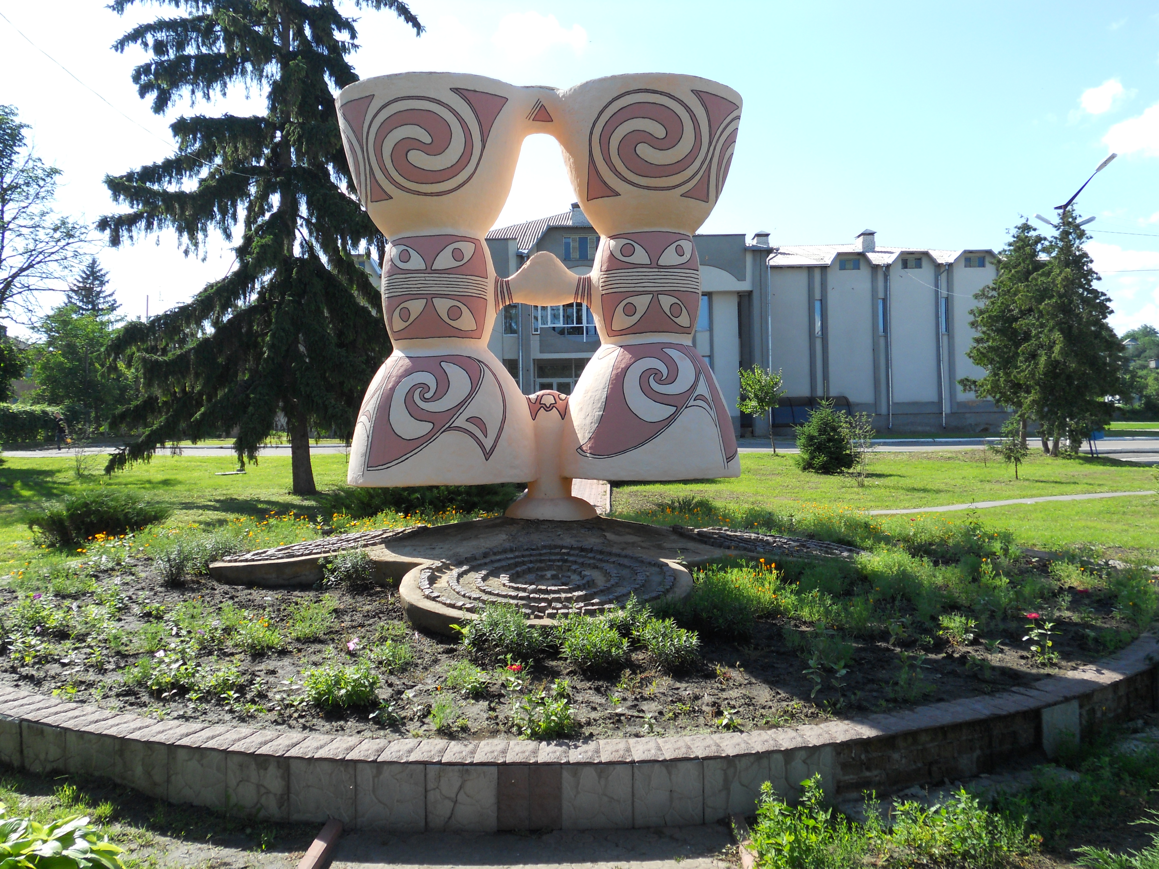 Невеличкий парк присвячений Трипільській культурі у Ржищеві. Посеред фотографії знаходиться трипільський "бінокль" (біноклевидна фігурка - одна із археологічних знахідок).